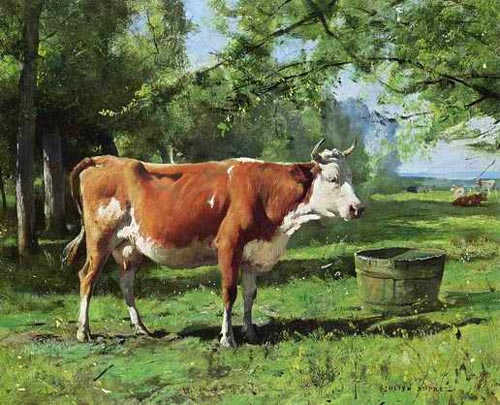 "Une vache à l'abreuvoir" toile de Julien Dupré